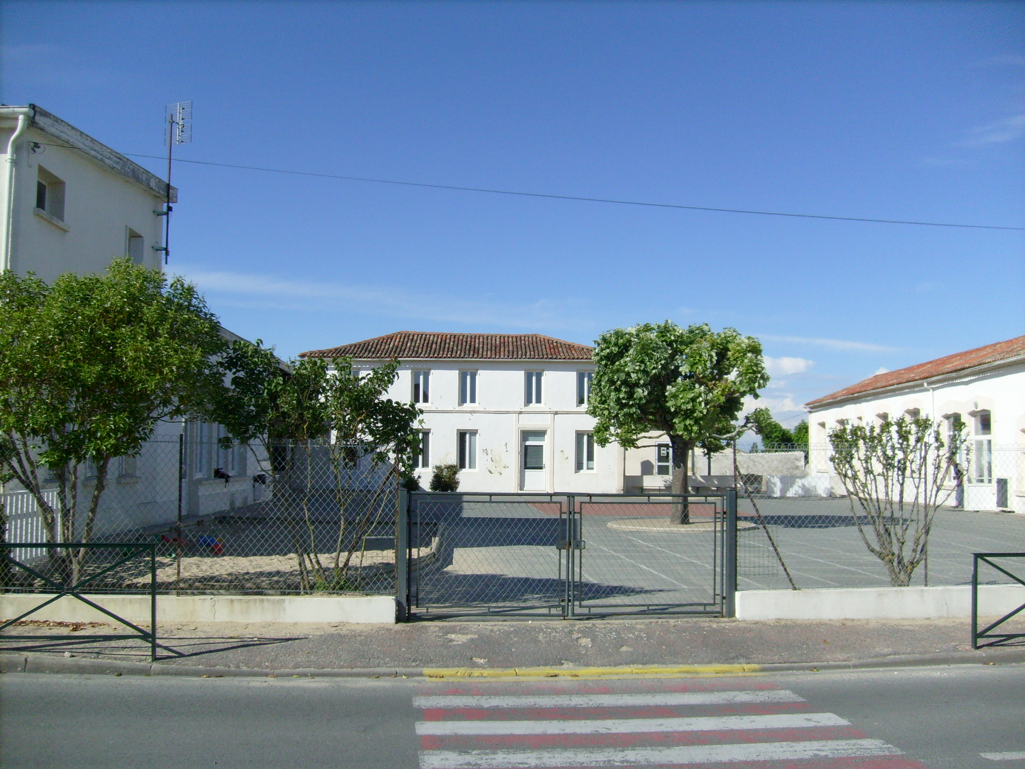 L'école de Médis, Charente-Maritime, France